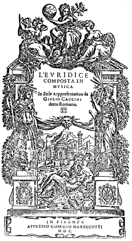 Titelblad van Eurydice van Giulio Caccini (1602)